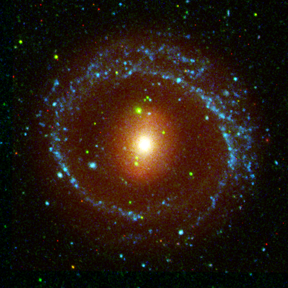 NGC 1291